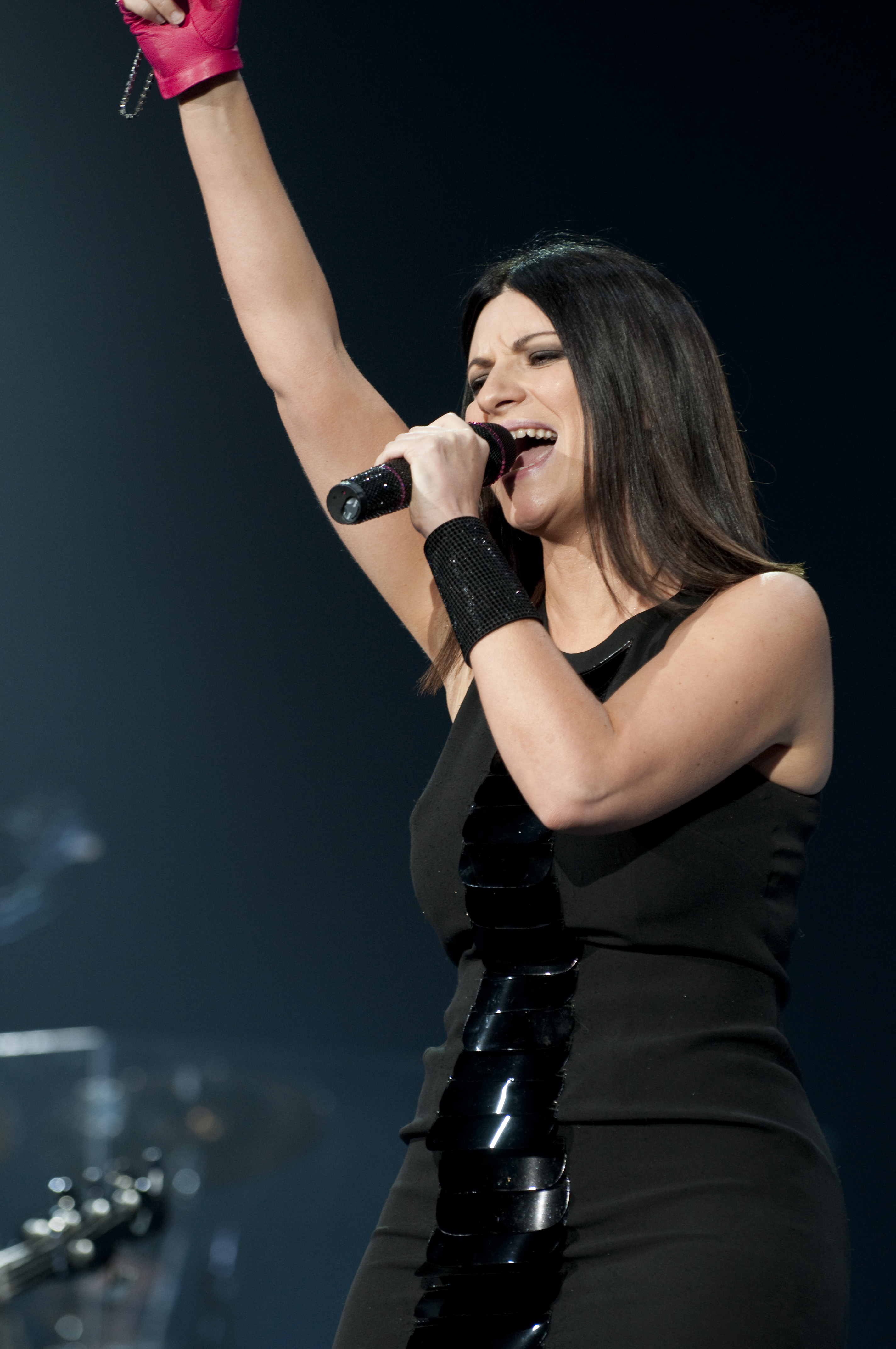 Laura Pausini